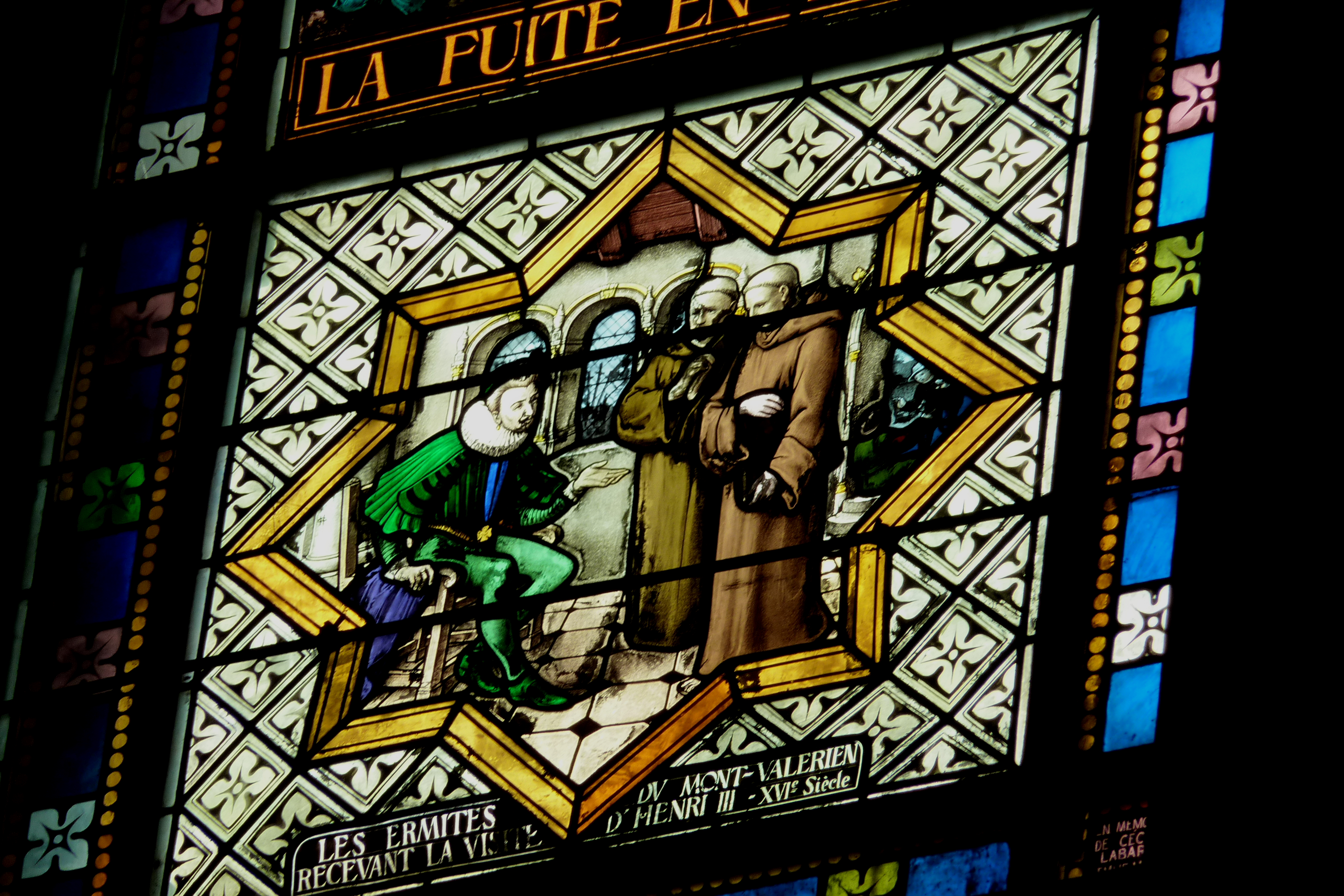 Bleiglasfenster (Ausschnitt) in der katholischen Pfarrkirche Cœur-Immaculé-de-Marie in Suresnes, Darstellung: Heinrich III. wird von den Mönchen des Mont Valérien empfangen